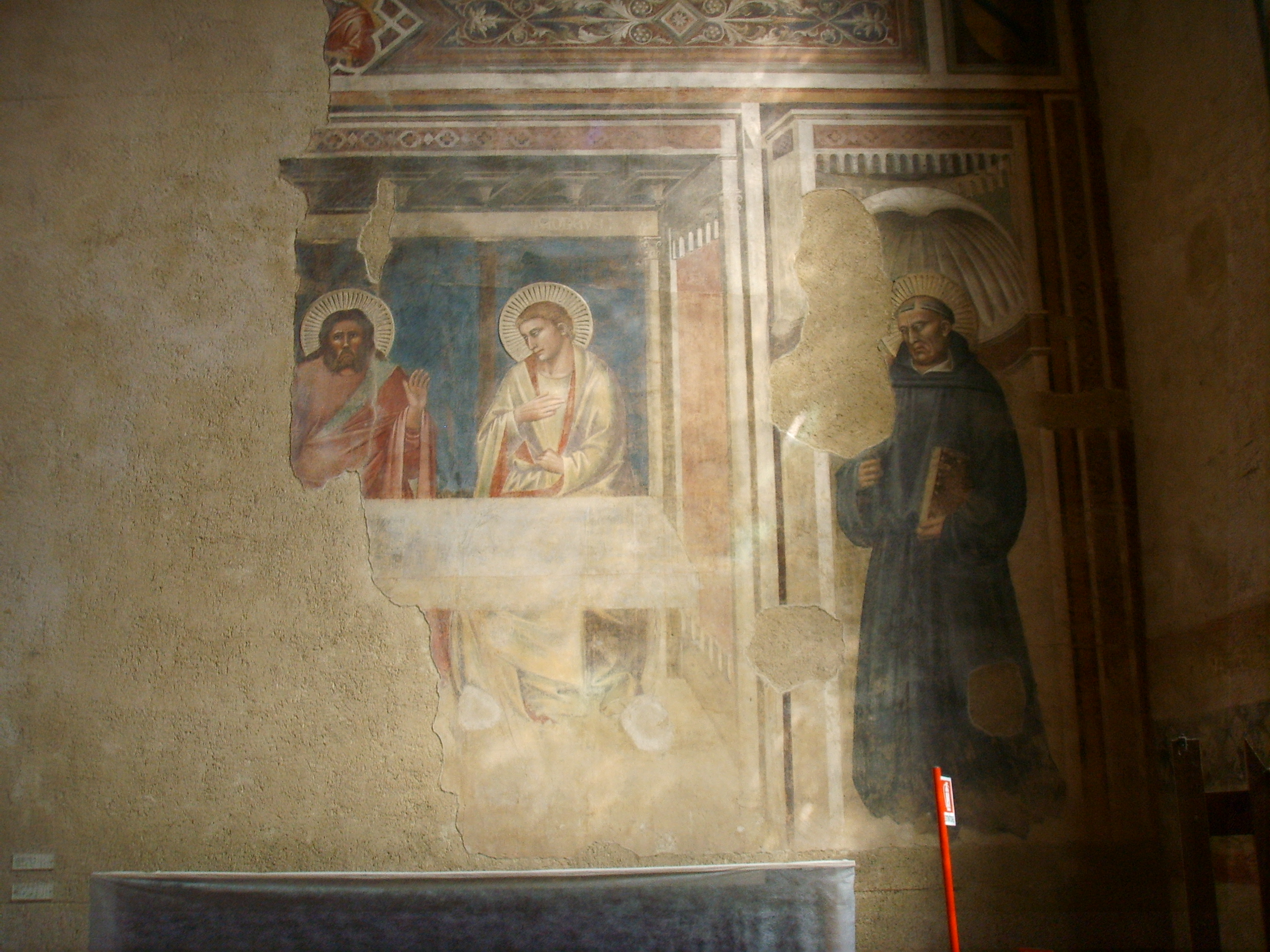 Santo Spirito church, Cenacolo dell'Orcagna, in Florence Italy